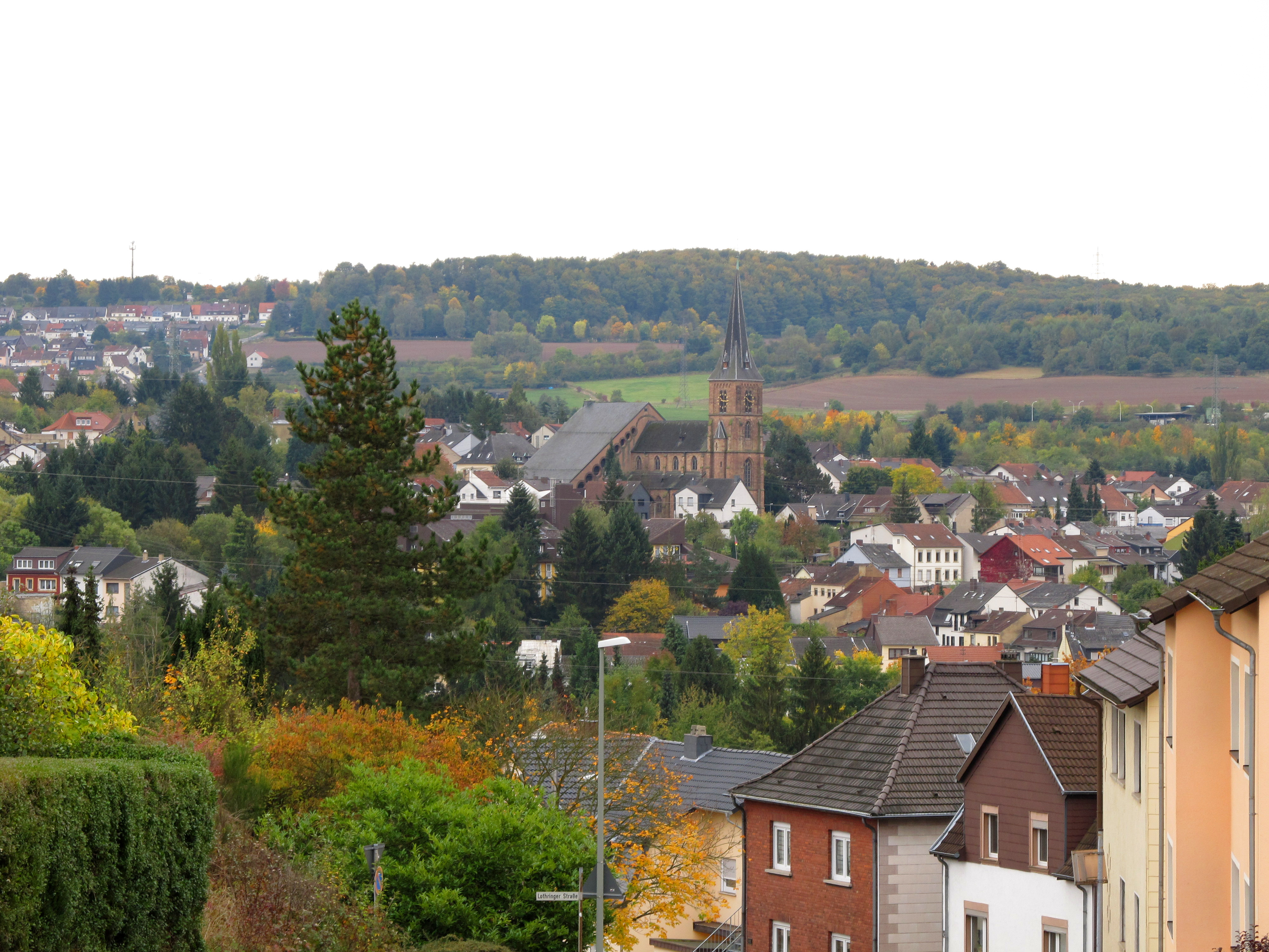 Ansicht von Püttlingen, Saarland. In der Bildmitte die kath. Liebfrauenkirche